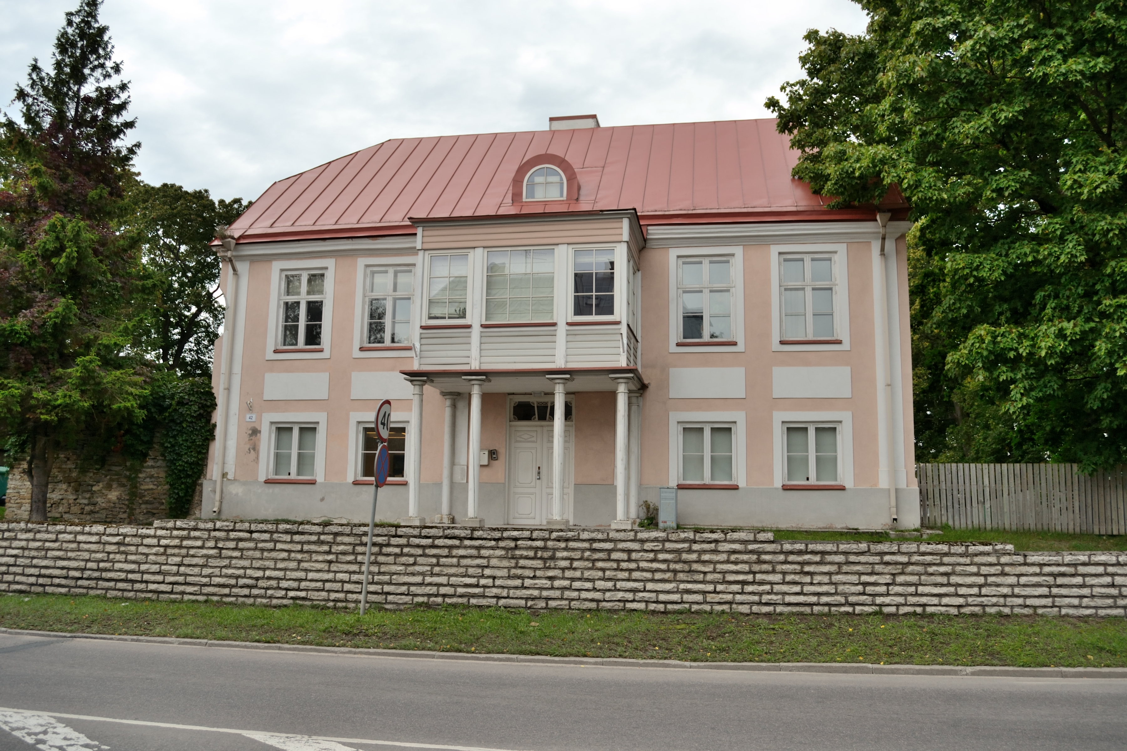 Sprincktal'i suvemõis, 18.-20. saj